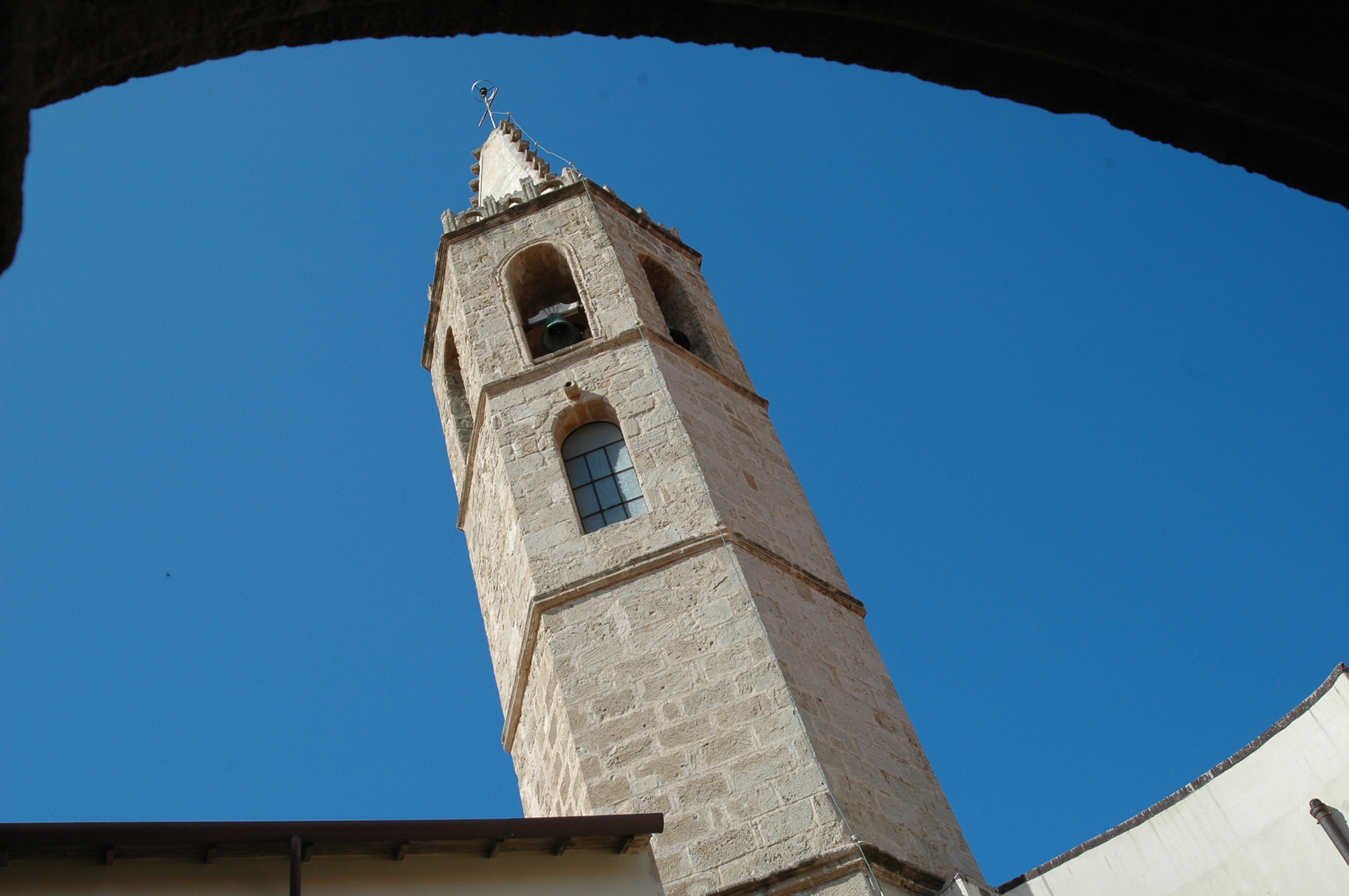 Description